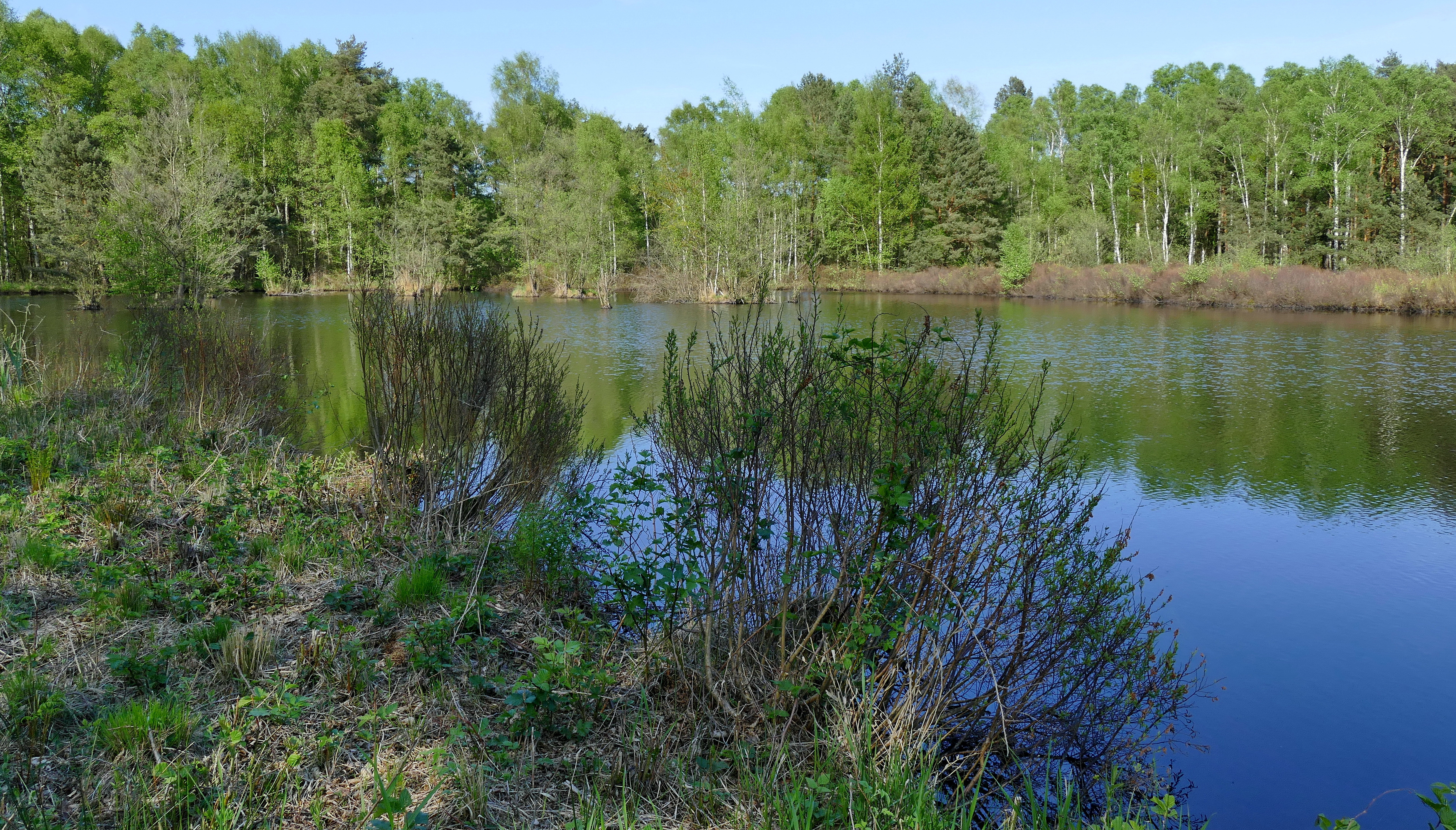 Die Teiche im Trunnenmoor sind Eigentum des NABU Burgwedel und Isernhagen e.V. Sie liegen im NSG (HA 047) und FFH-Gebiet (3425-301) "Trunnenmoor". Im Frühling blühen am Ufer der Teiche die Gagelsträucher (Myrica gale).